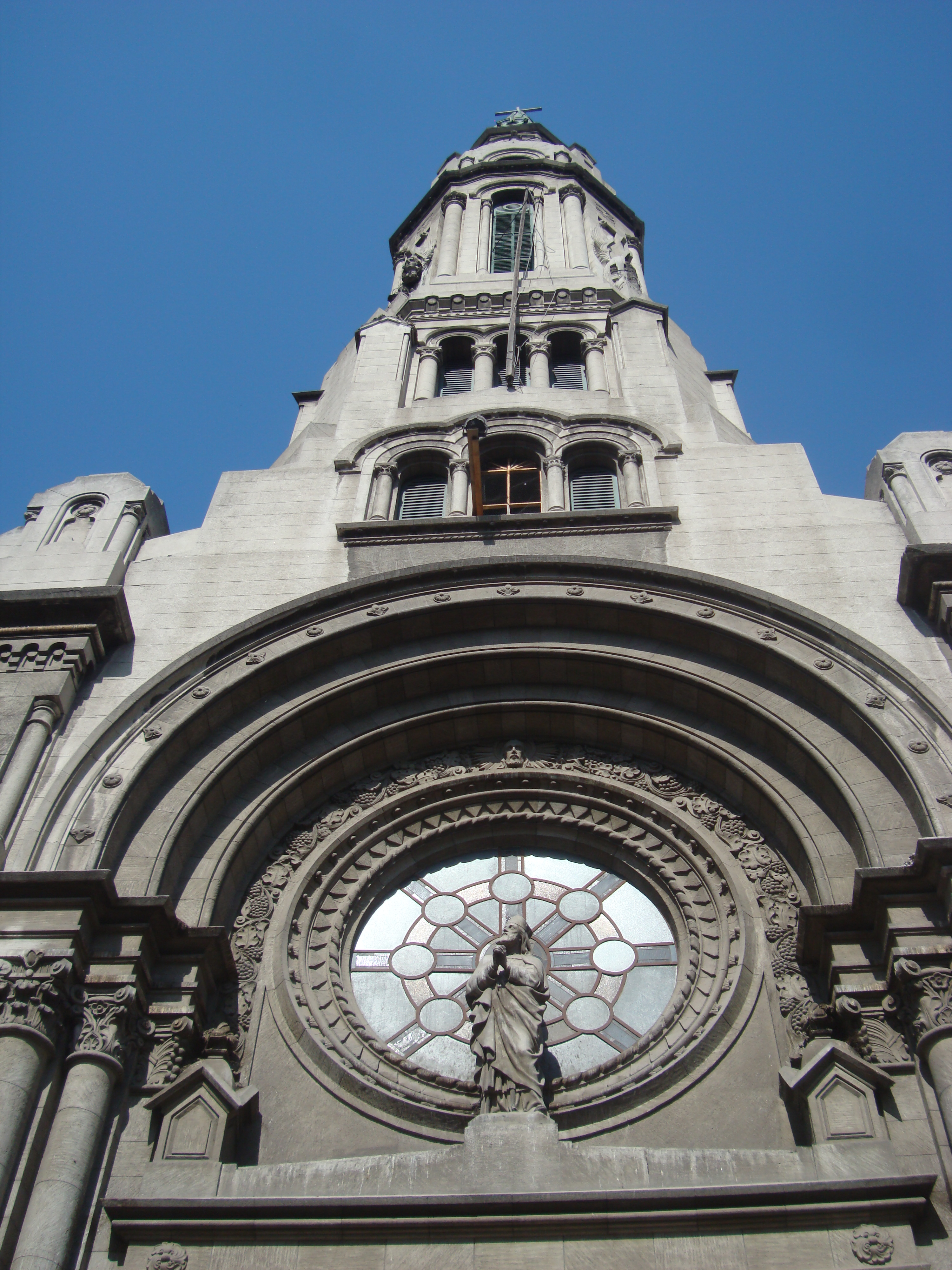 Iglesia calle ejercito en santiago de chile